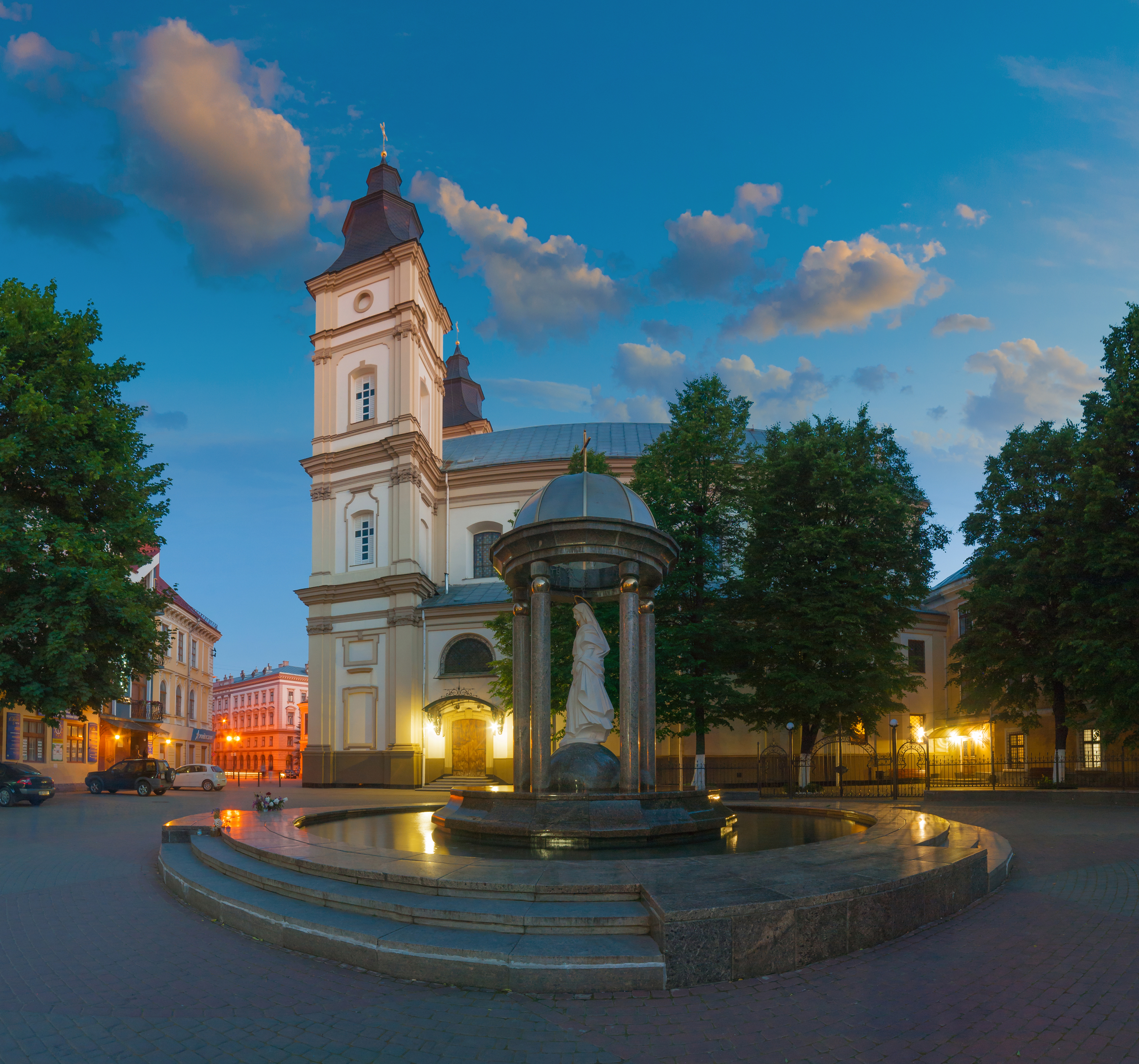 Костел Єзуїтів (Собор Святого Воскресіння), Івано-Франківськ, Майдан Шептицького, 22